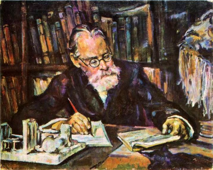 Мікалай Тарасікаў. Партрэт акадэміка Н. М. Нікольскага. Палатно, алей